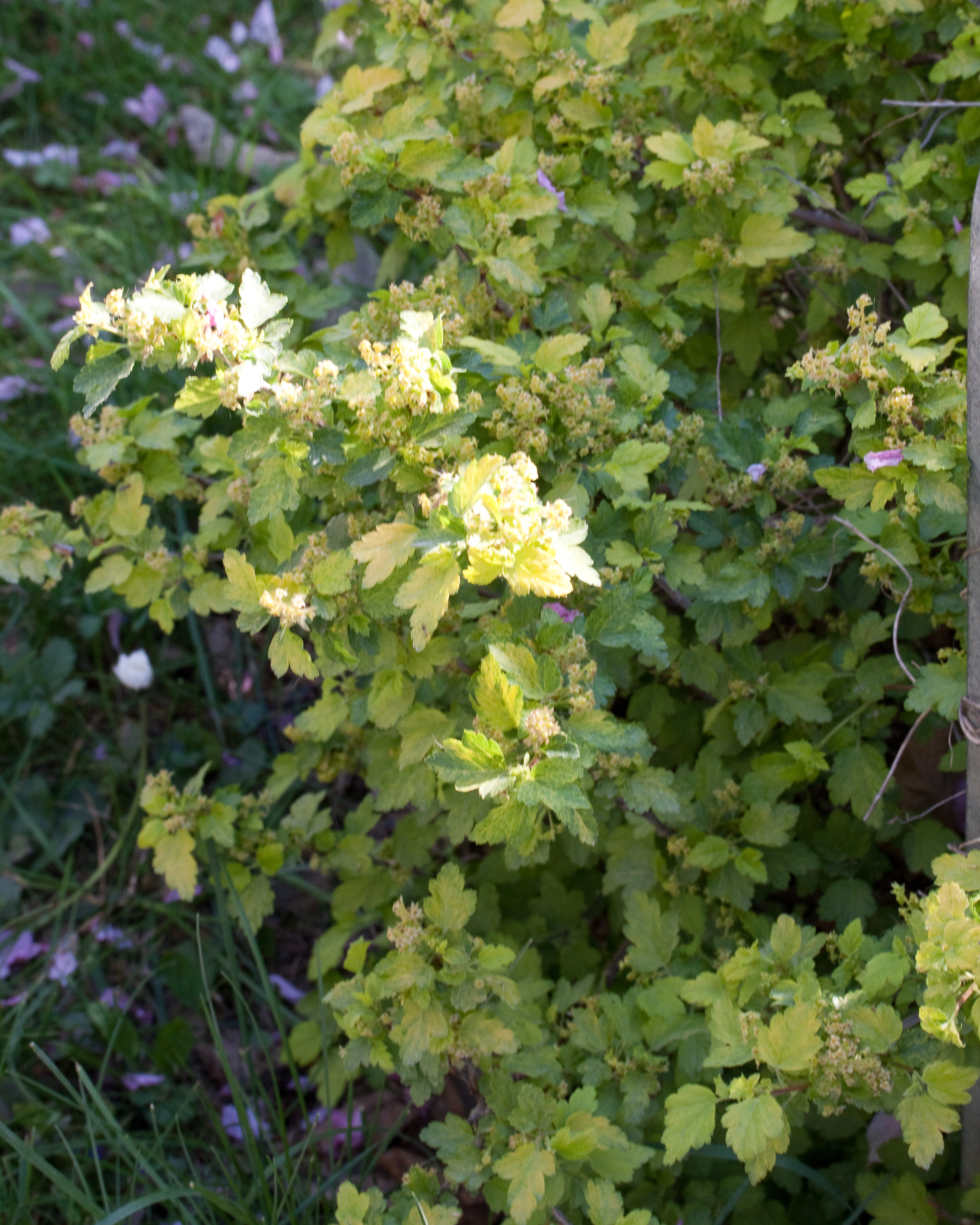 Ribes alpinum 'Aureum' - Floraison - Jardin des Plantes - Paris